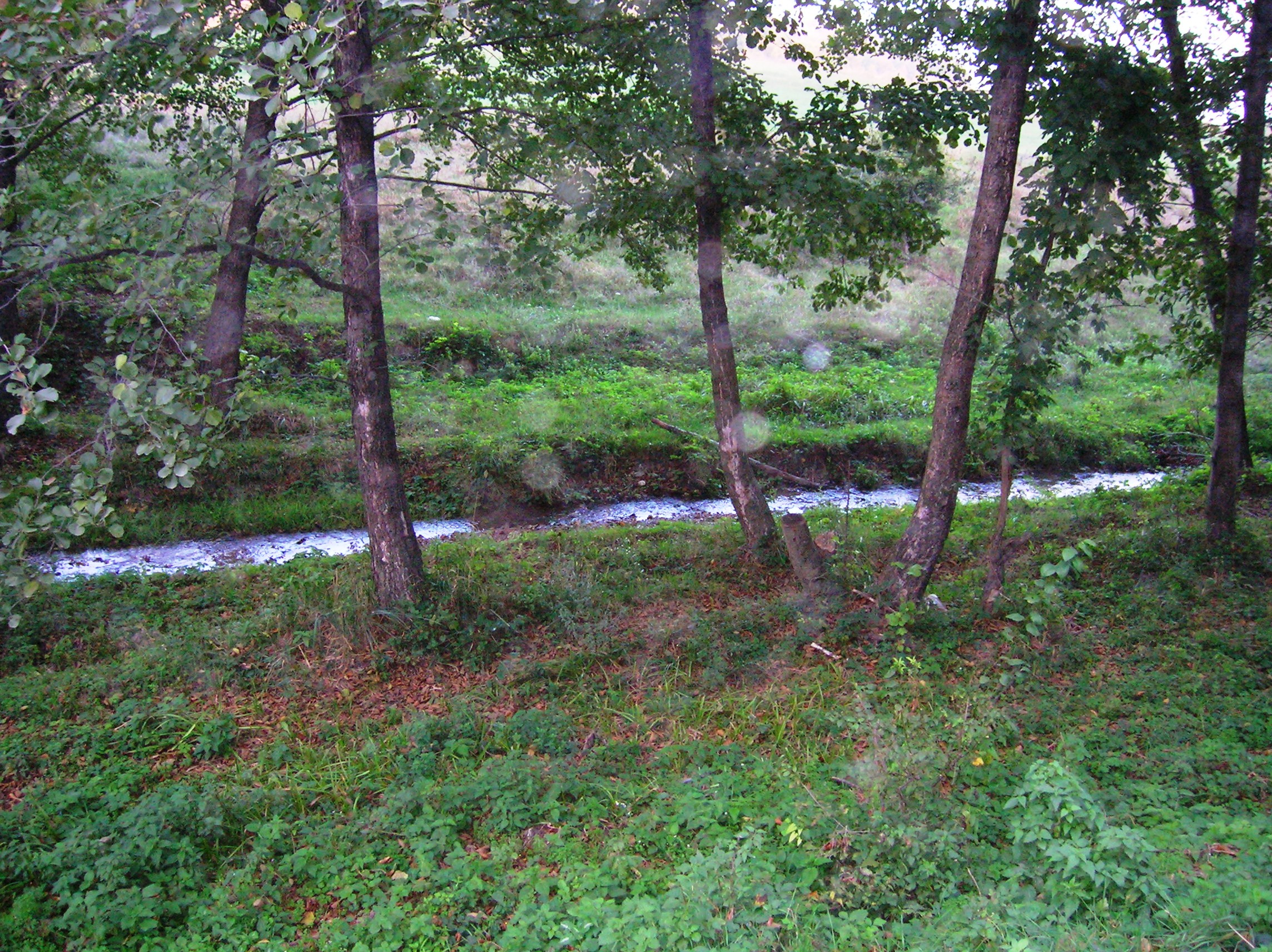 Comuna Valea Seacă Bacău - apa Văii Seci spre pădure